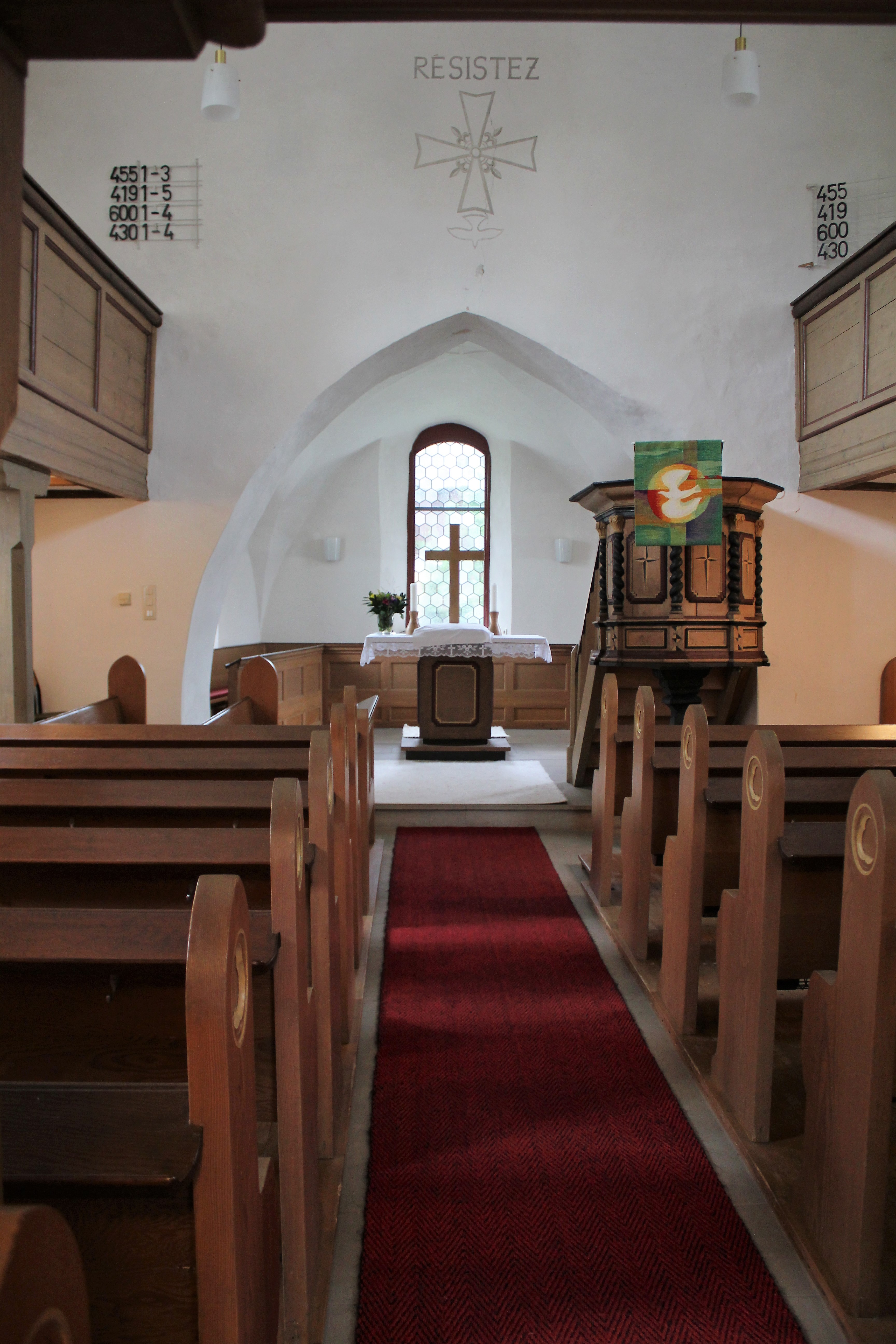 Evangelische Kirche Daubhausen, Lahn-Dill-Kreis, Hessen, Deutschland